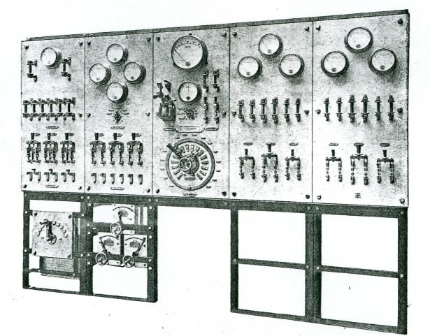 vue d'un jeu d'orgue electrique (1896)